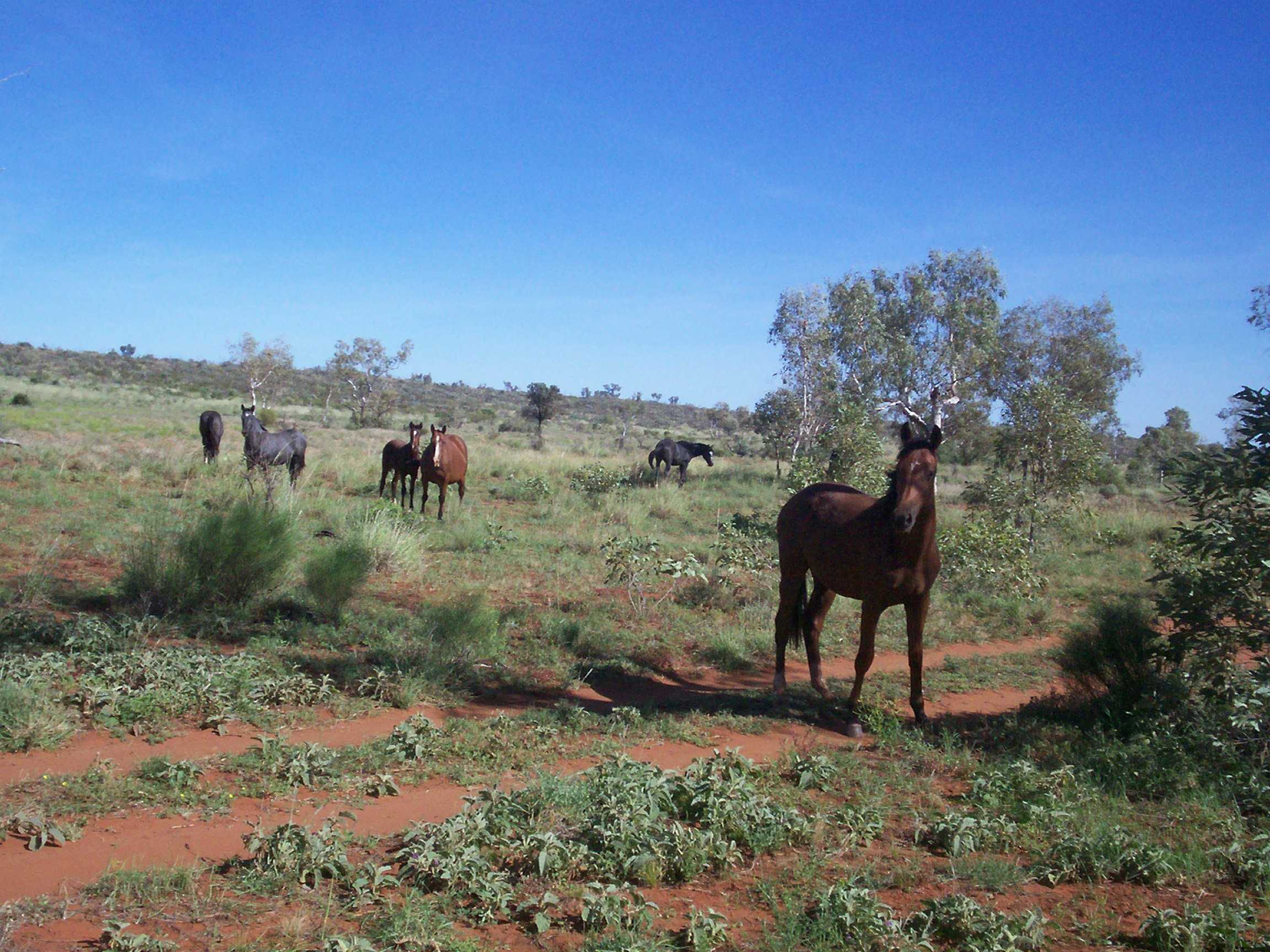 Photo self taken.